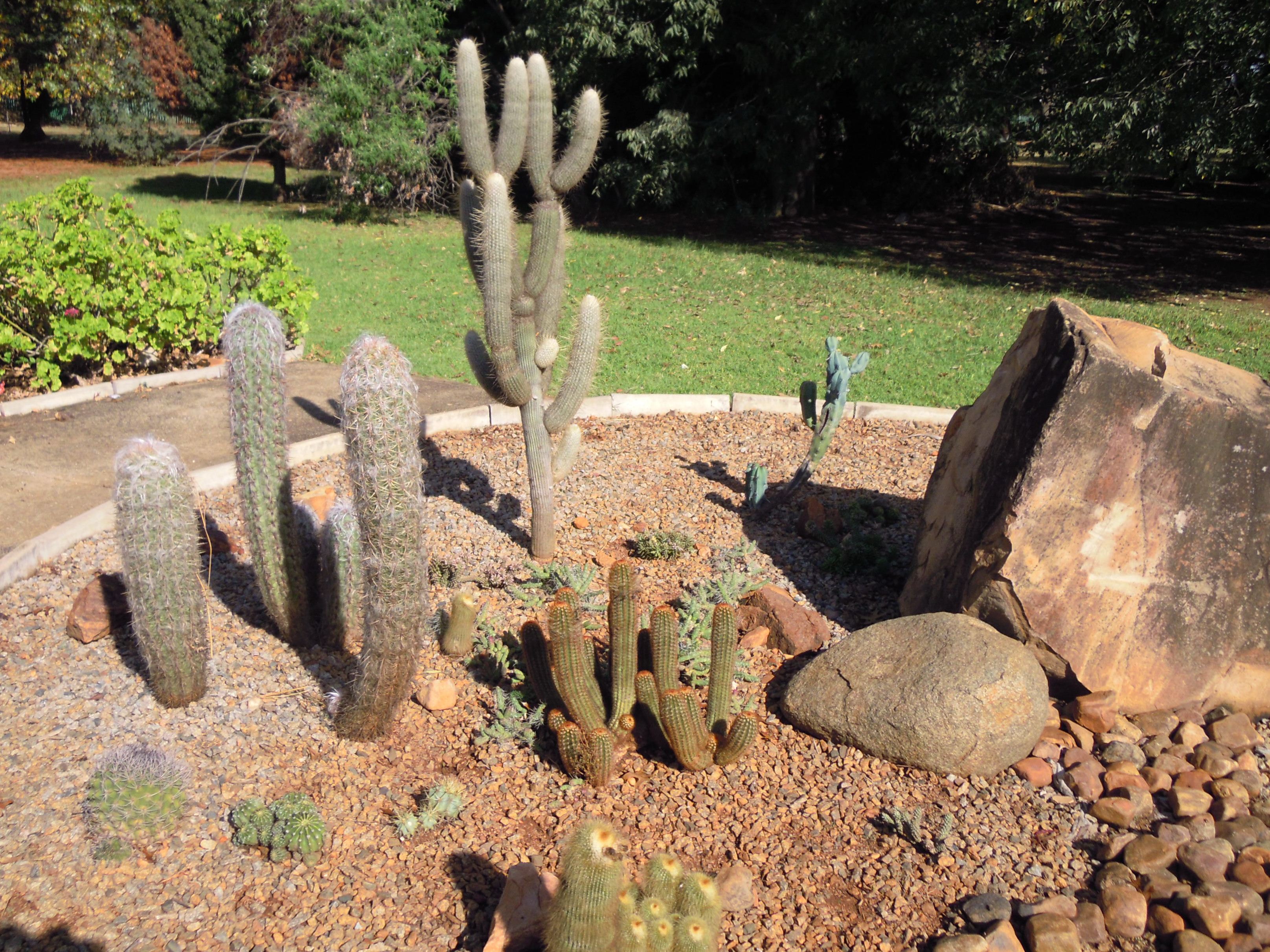 Cacti in succulent garden at Johannesburg Botanical Gardens